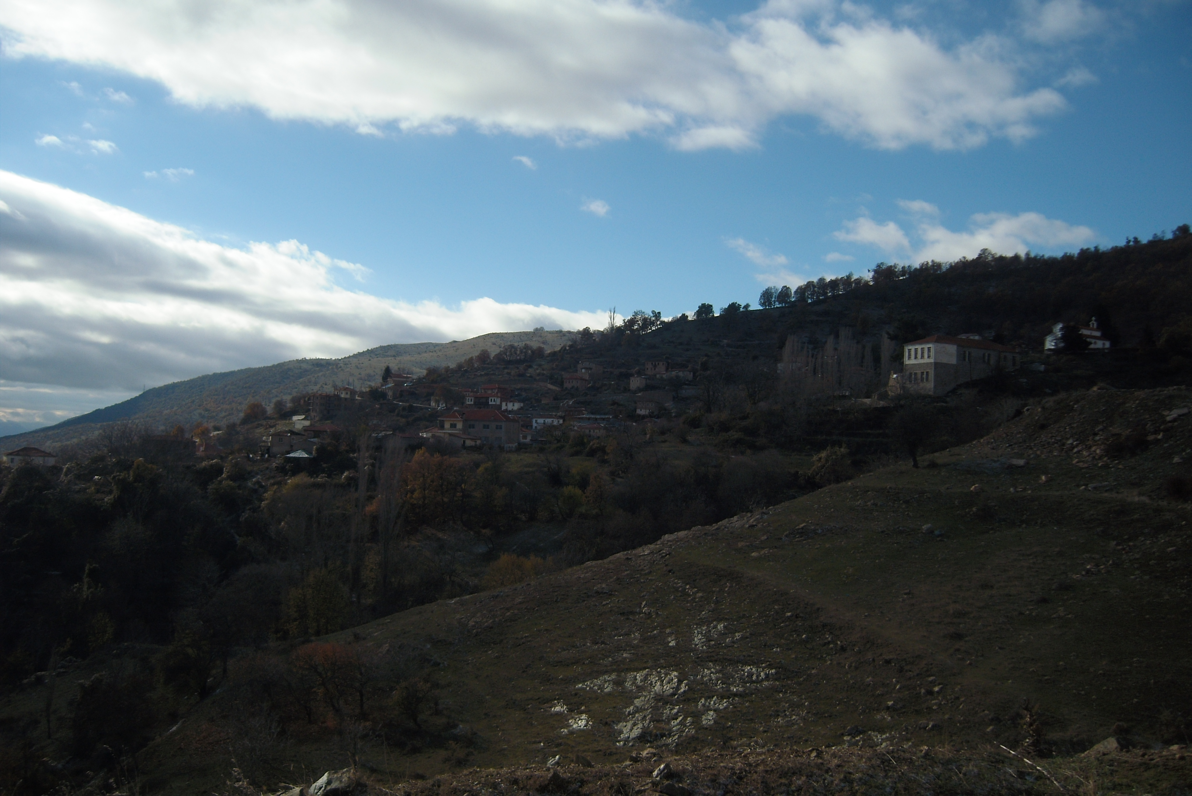 Шестеово от пътя за Жервени.